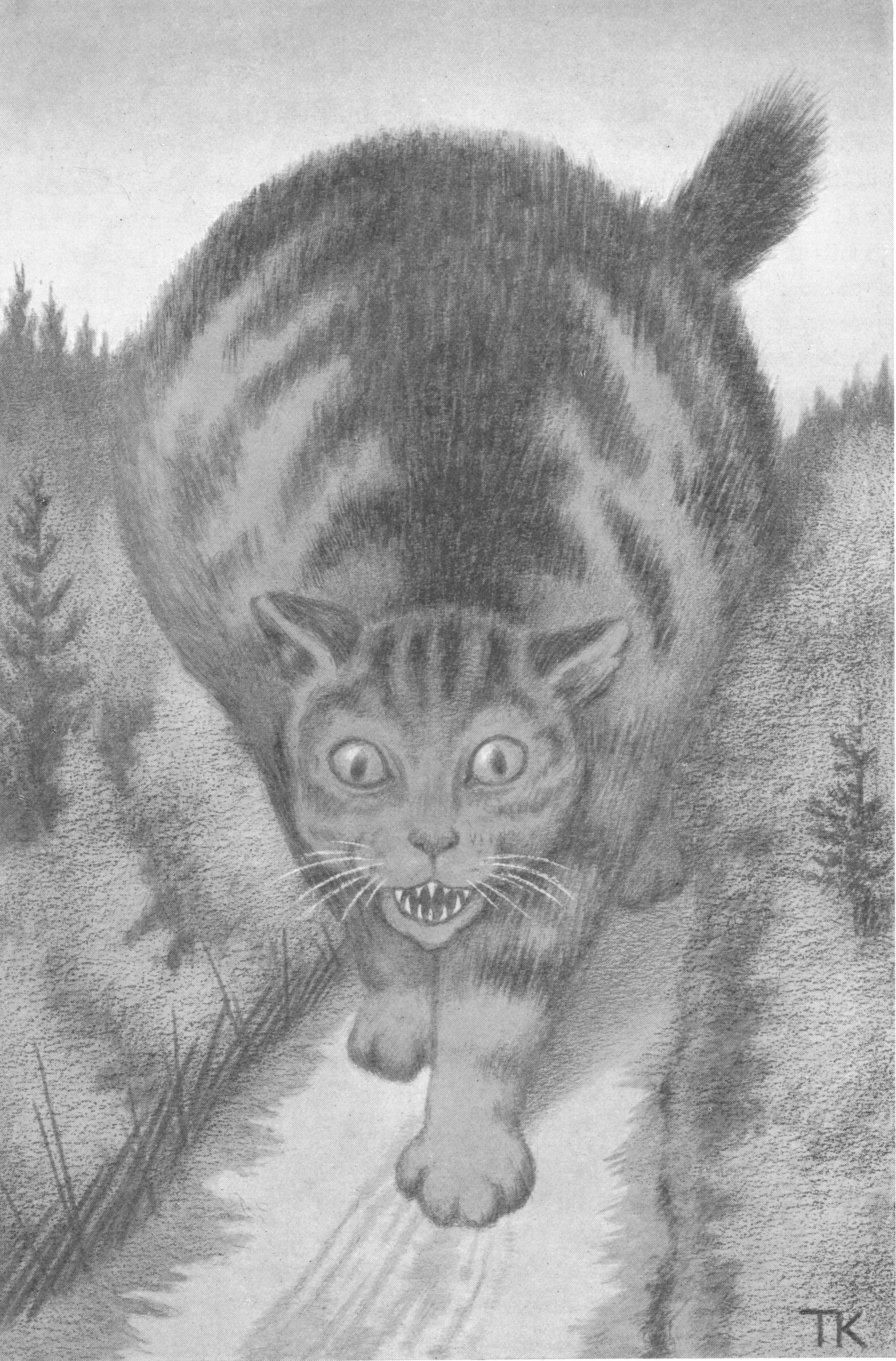 Illustrasjon til folkeeventyret Kjetta som var så fæl til å ete «Så gikk Kjetta langt og lenger enn langt.» Scanned illustration from 1936 edition of Asbjørnsen & Moe: Samlede eventyr. Norske kunstneres billedutgave. Gyldendal Norsk forlag.